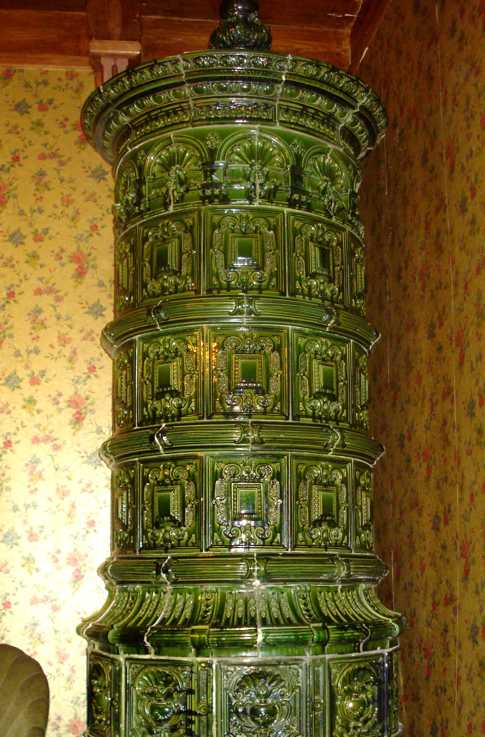 The Dutch stove made of green tiles in the snape of a vase in the sitting room. Alexander Pushkin Museum in Vilnius. Žalių koklių krosnis svetainėje (Literatūrinis Aleksandro Puškino muziejus. Subačiaus g. 124)